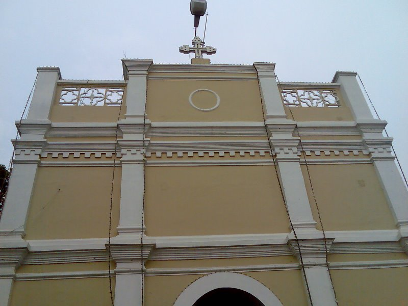 മലയാറ്റൂർ പള്ളി